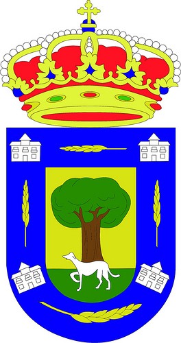 escudo Palacios de Goda